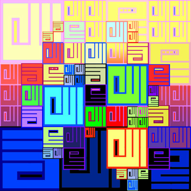 عادل عبد الرحمن،لفظ الجلالة،جواش على ورق ،من تصويرى ويصرح باستغلالها في كافة الأغراض على مسئوليتى الشخصية